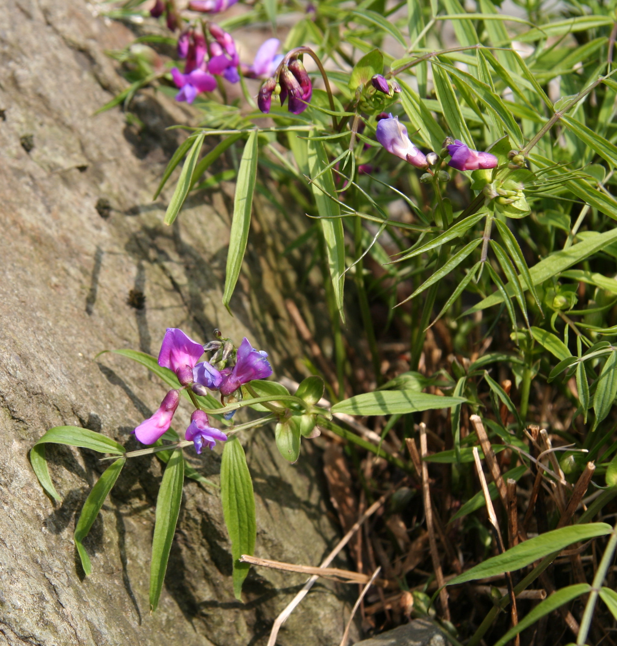 Lathyrus alpestris im Botanischen Garten Dresden